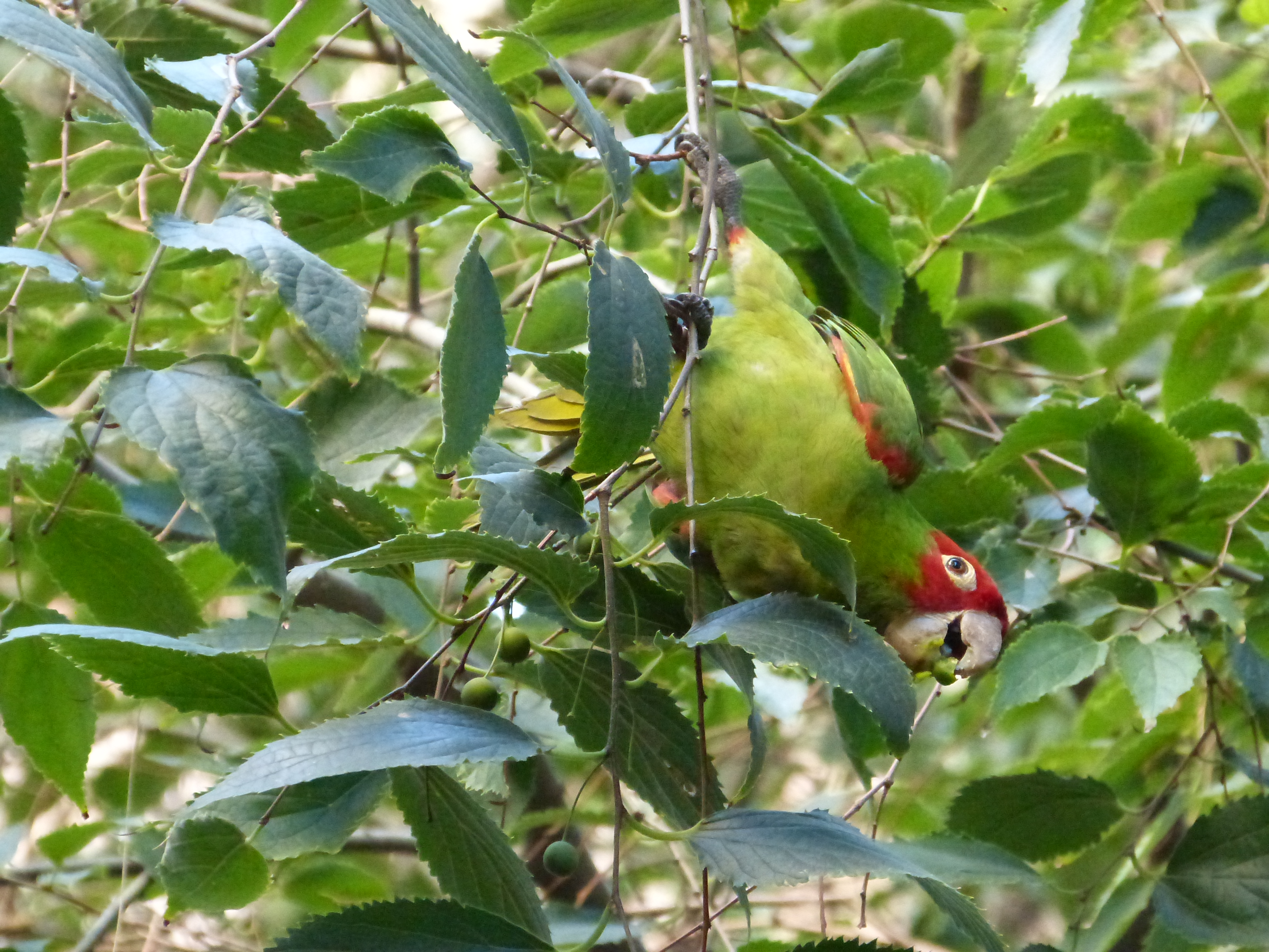 Ejemplar de la especie Aratinga erytrogenys (Psittacidae) comiendo en un almez (Celtis australis) de Valencia (España)